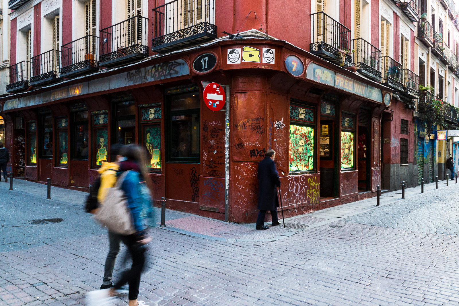 Corredera Alta de San Pablo número 17, esquina con calle de San Vicente Ferrer.